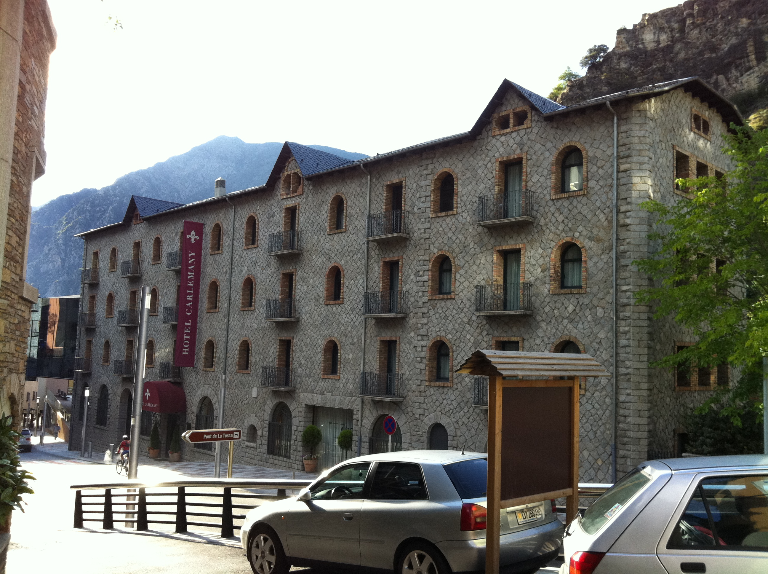 Hotel Carlemany